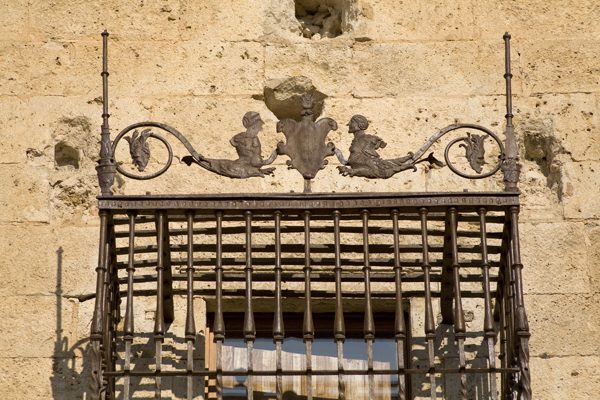 unidentified Spain